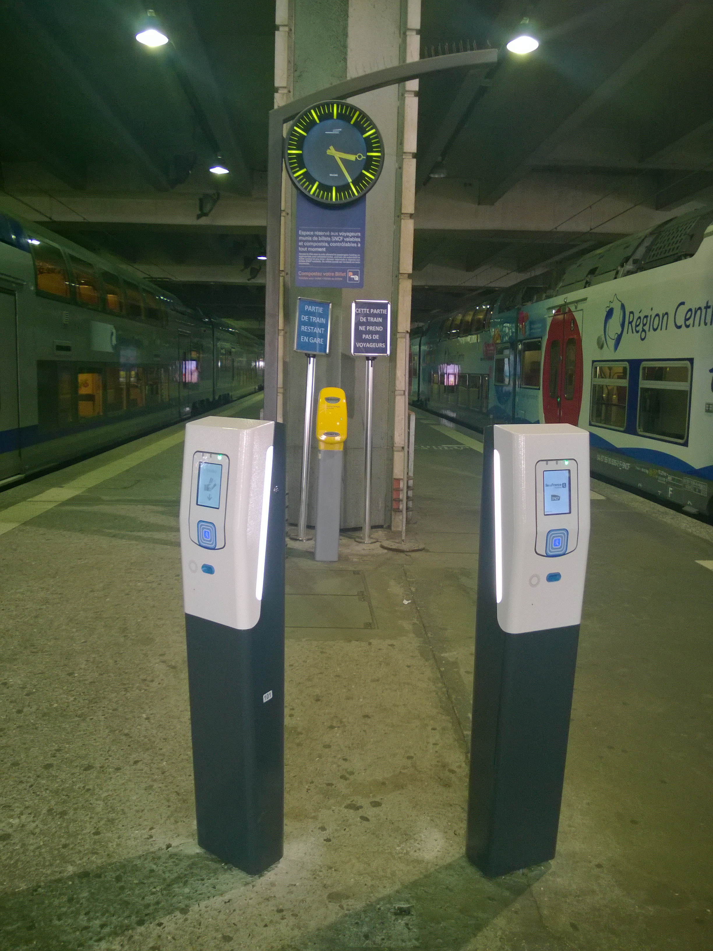 Voies TER/TGV de la gare Montparnasse-1, département de Paris, France.Nouvelles bornes de validation pour cartes Navigo.